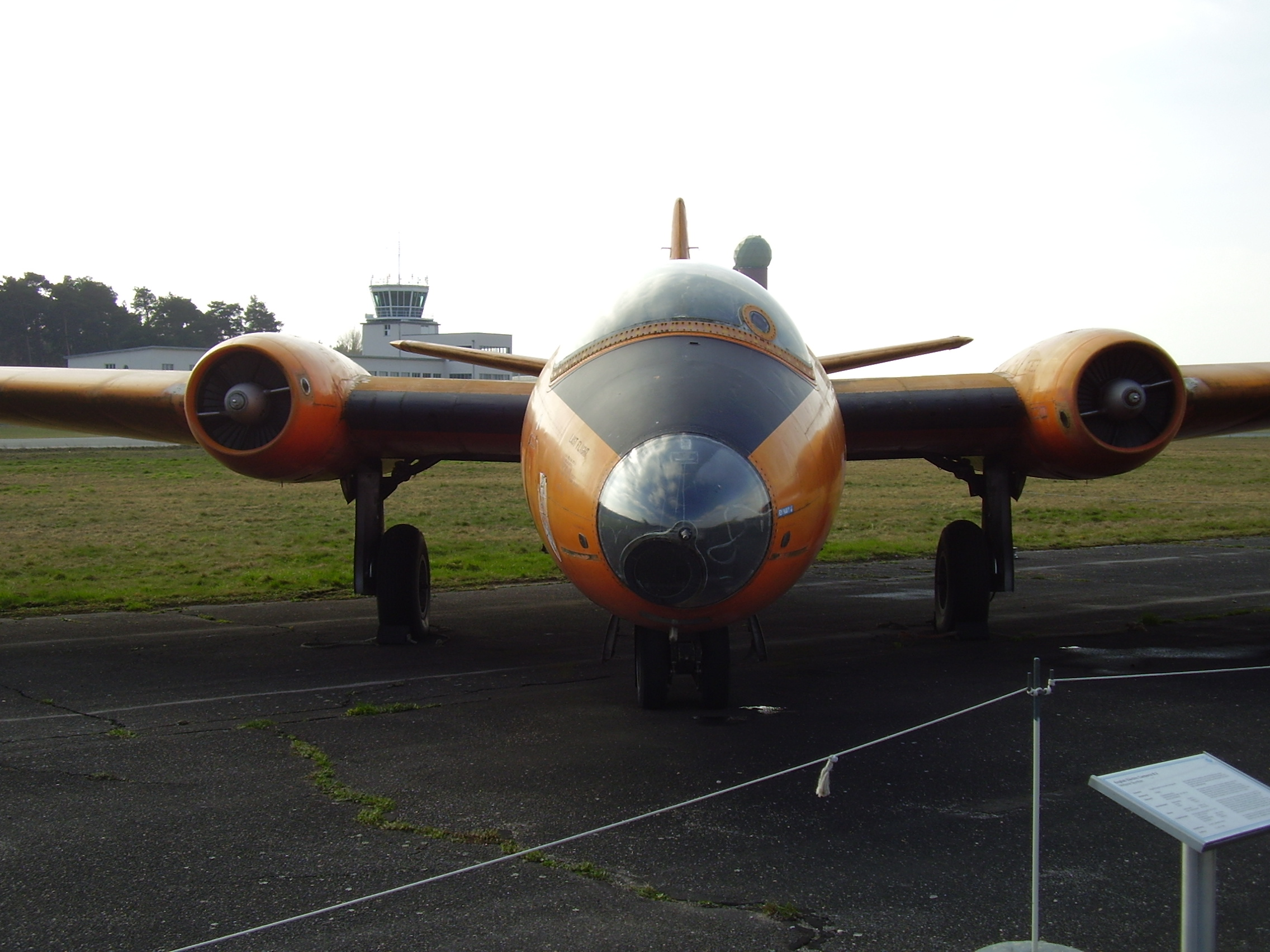 Luftwaffenmuseum der Bundeswehr; Airforce Museum of the Bundeswehr; Berlin-Gatow